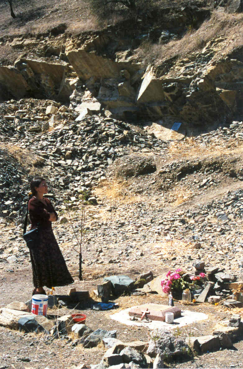 Memorial conmemorativo de la violación de los DDHH en Chile durante el régimen de Pinochet